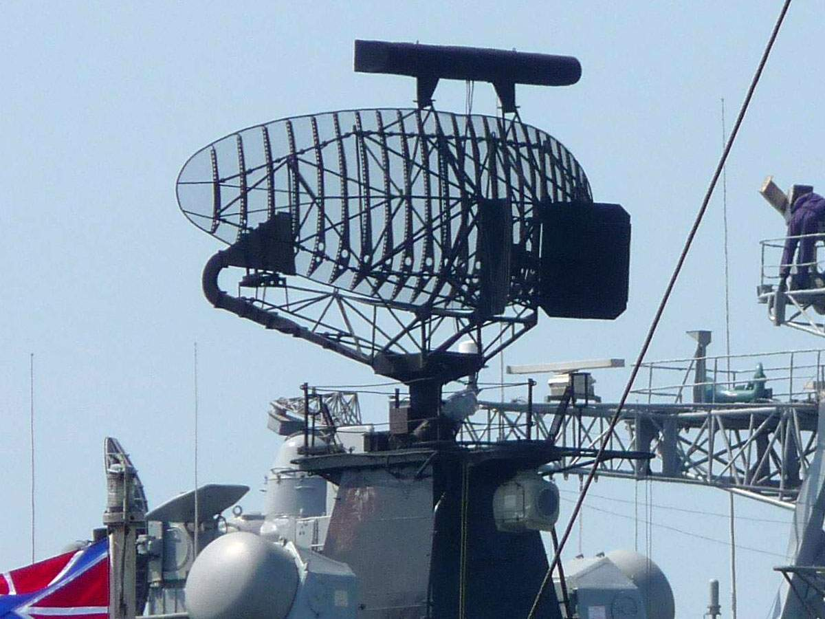 Двухкоординатный радар дальнего обзора RALW (индийский клон Signaal LW08) на грот-мачте эсминца D61 «Дели» ВМФ Индии. Сверху маленькая антенка системы распознавания «свой-чужой». Снято во время визита индийских кораблей во Владивосток 19.04.2011 г.